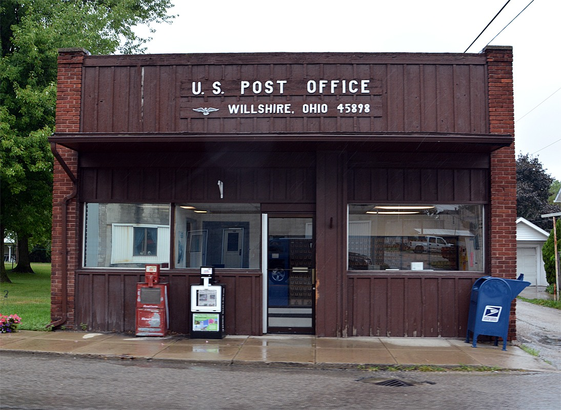 Willshore OH post office